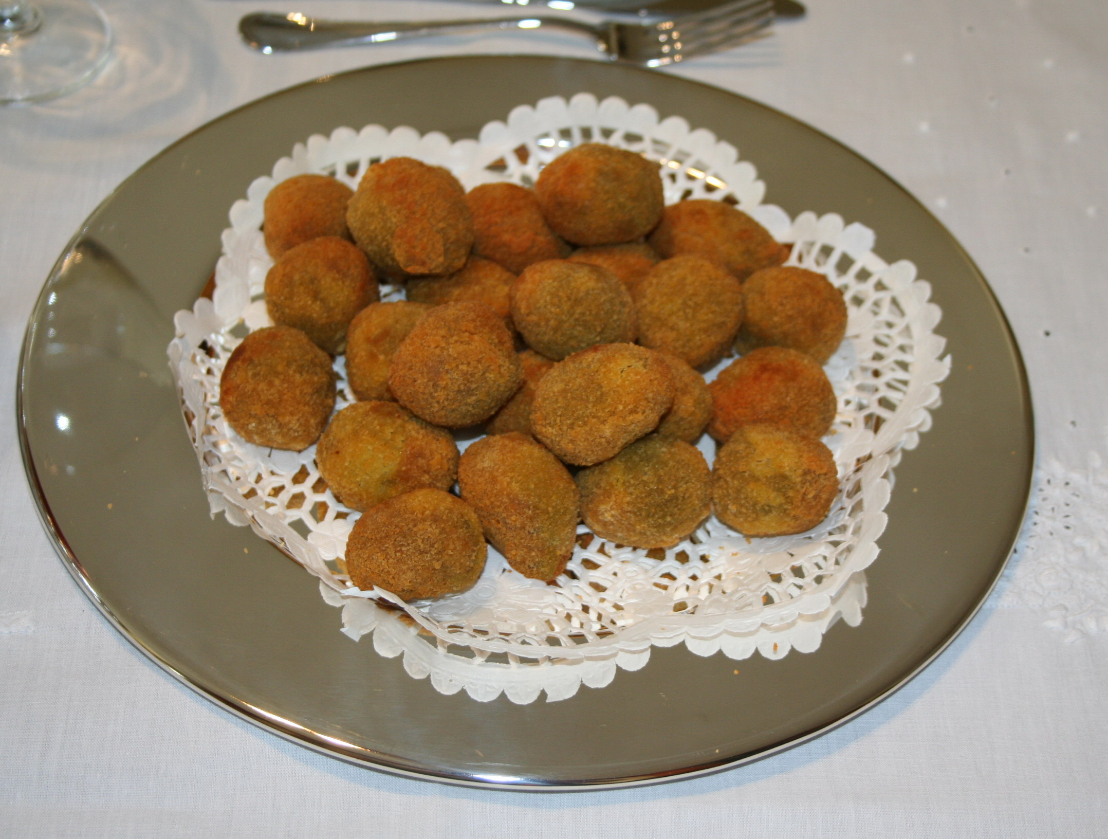 Infinitispazi, proprio scatto, olive ascolane fritte, di Ascoli Piceno, interno , "Utilizzo concesso". This file is licensed under Creative Commons 2,5 license